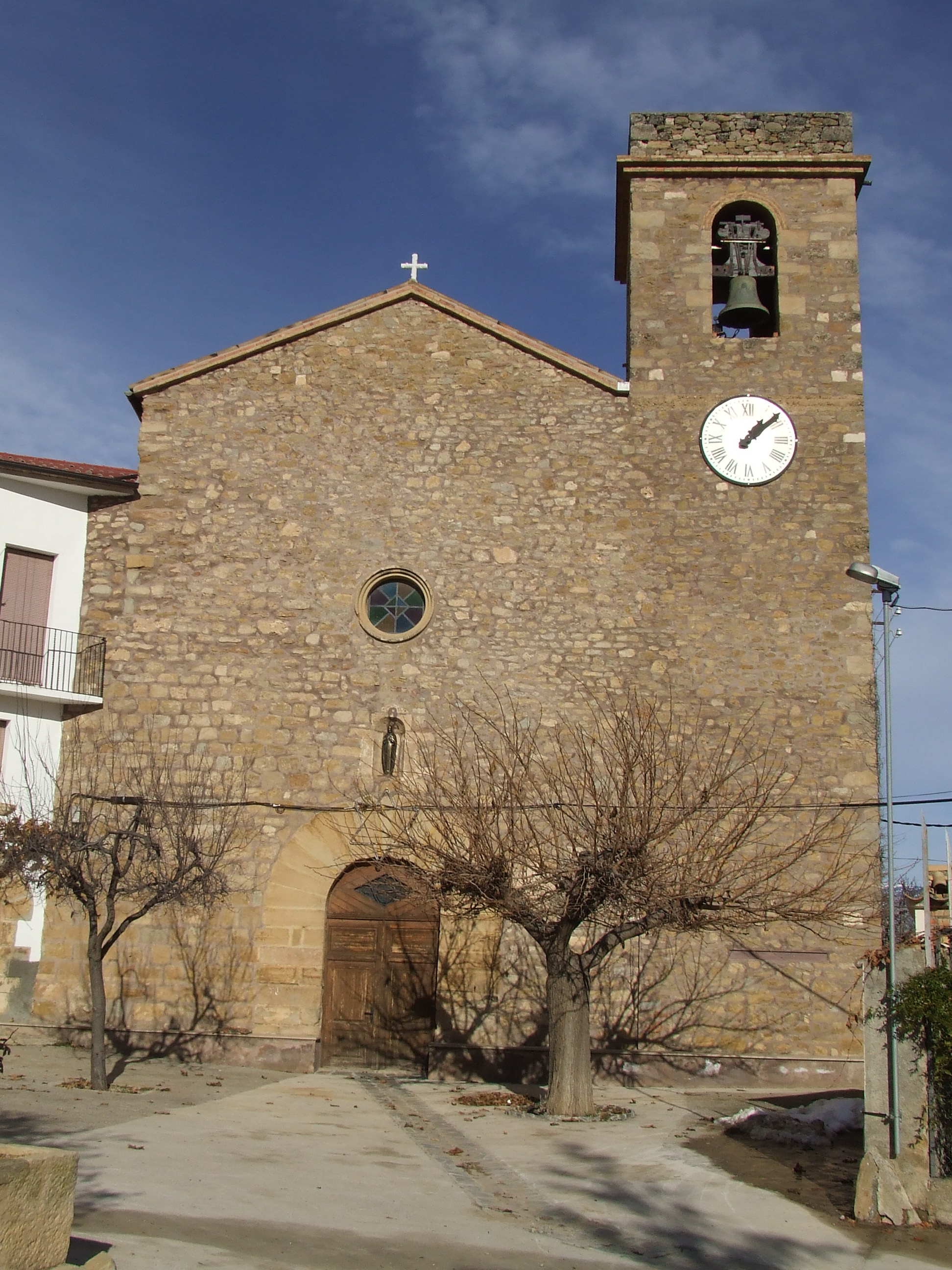 L'església parroquial de Sant Salvador de Toló (Gavet de la Conca, Pallars Jussà)